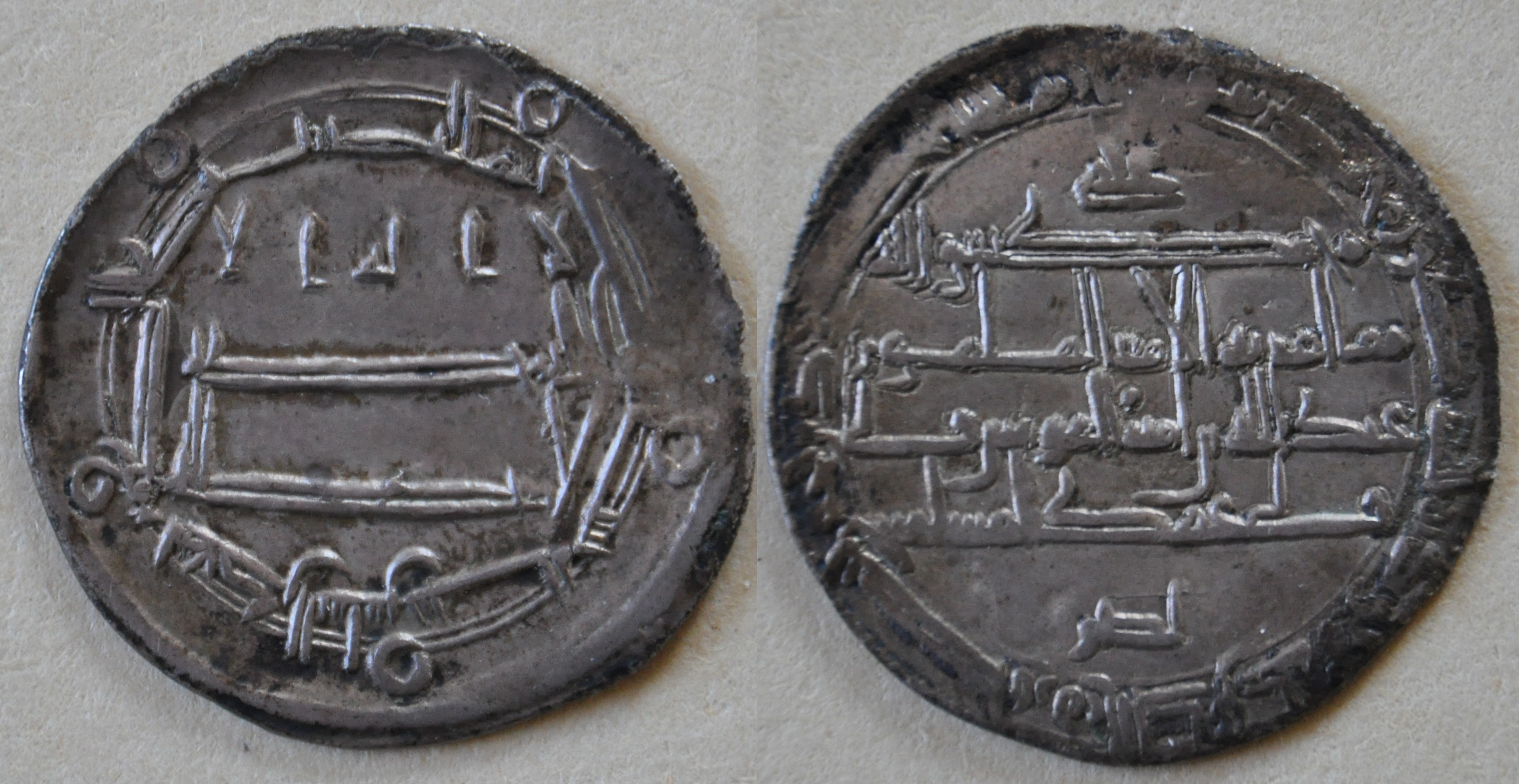 Un dirham en argent de Haroun Al Rachid (AH 170-193) (786-809 AD) de la dynastie abbasside, lieu d'émission Tachkent, Mad'an al-Shash en AH 190. Dimension : 25 mm Poids : 2.8 g. Référence : Mitchiner WI 173-174